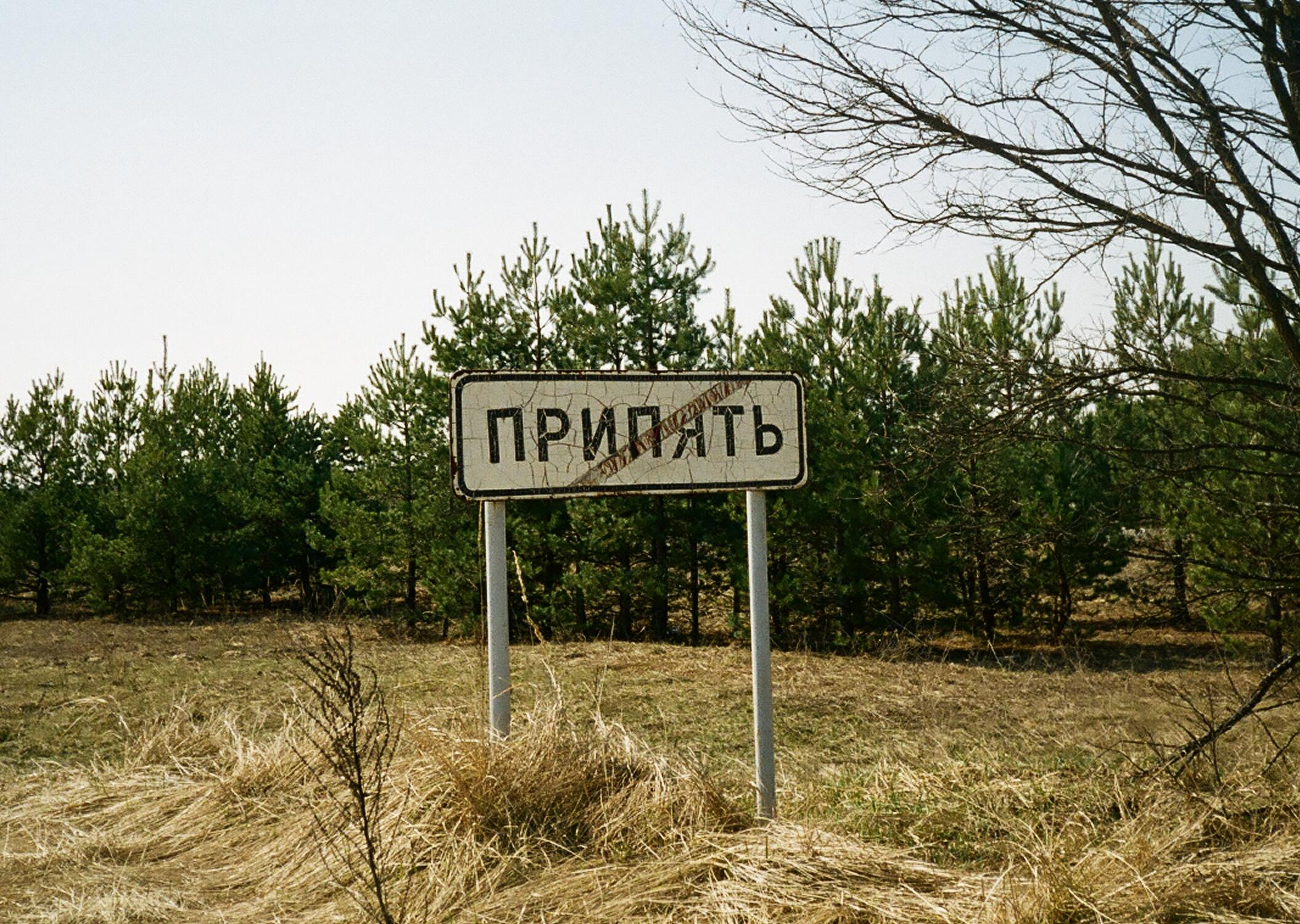 Pripjaty vége - helységnévtábla (Ukrajna)